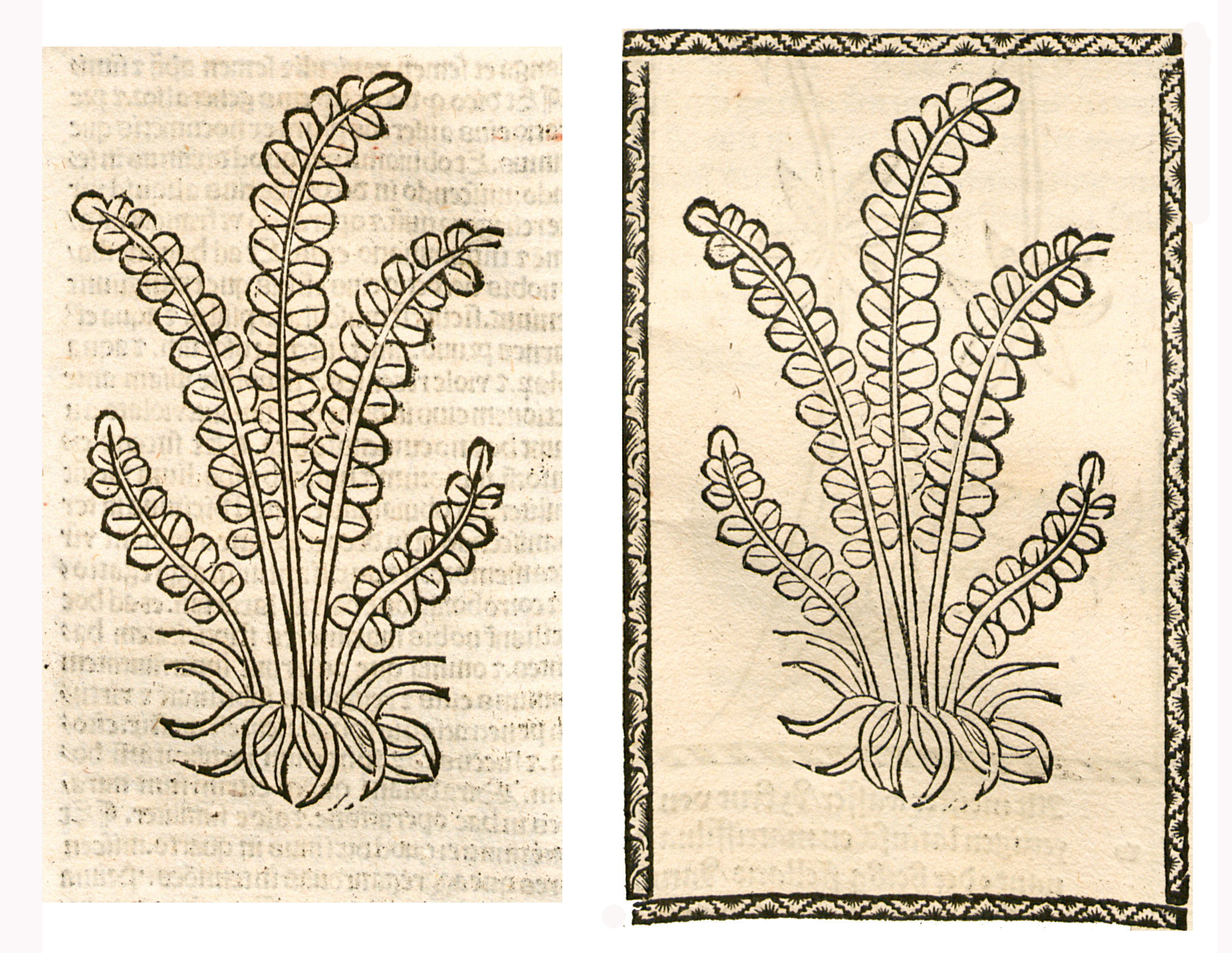 Abbildung von: Widertod (Asplenium trichomanes)